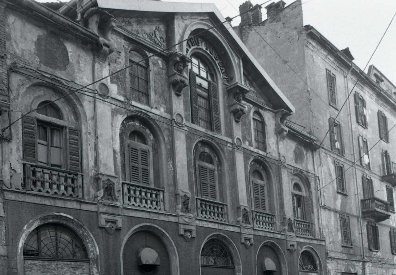 Servizio fotografico : Milano, 1975 / Paolo Monti. - Strisce: 3, Fotogrammi complessivi: 15 : Negativo b/n, gelatina bromuro d'argento/ pellicola ; 35 mm. - ((Sul portanegativi: N[I]K[MA]T Tri-X iscrizione documentaria e didascalica manoscritta a penna nera "1/15 Milano - P.ta Garibaldi - fossati e case". - All'interno del portanegativi: la serie è anche identificata da una linea orizzontale a pennarello nero che separa la suddetta serie dalla successiva di soggetto diverso. - Fonte: Agenda di Paolo Monti: Leica 1501-3000 Controllo numerazione (1950-1978), presso Archivio Paolo Monti